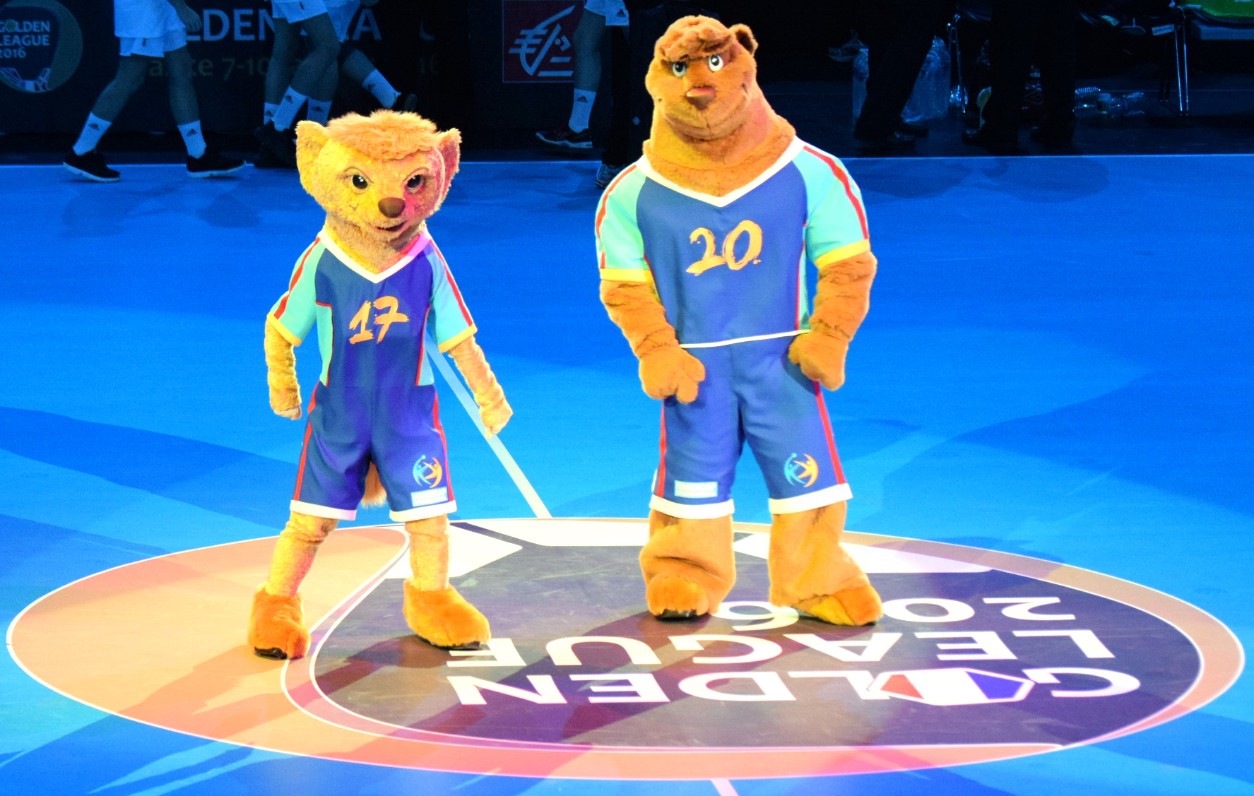 Le 10 janvier 2016 lors du match Norvège / Qatar durant la Golden League à l'AccordHotel Arena (Paris). Les masquottes du Mondial de Handball 2017, Rok et Koolette